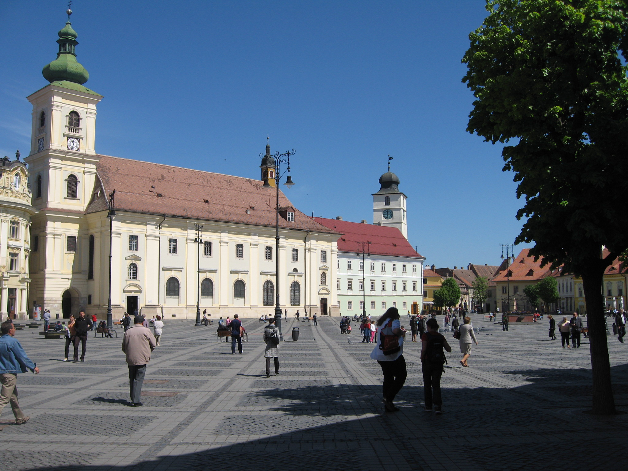 Biserica romano-catolica din Sibiu